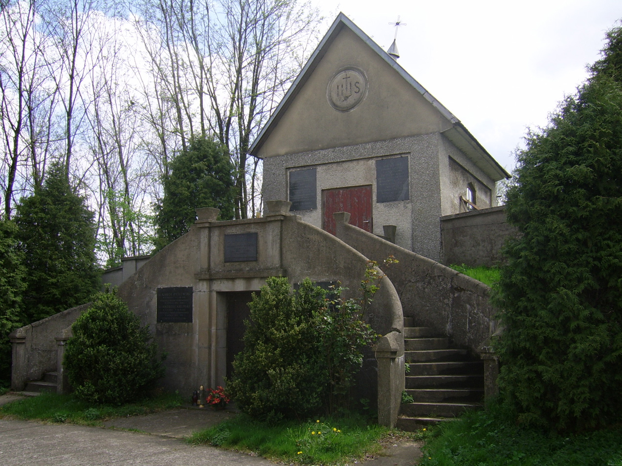 Dobranowice (powiat krakowski) - Kaplica cmentarna przy kościele pw. Św. Krzyża.